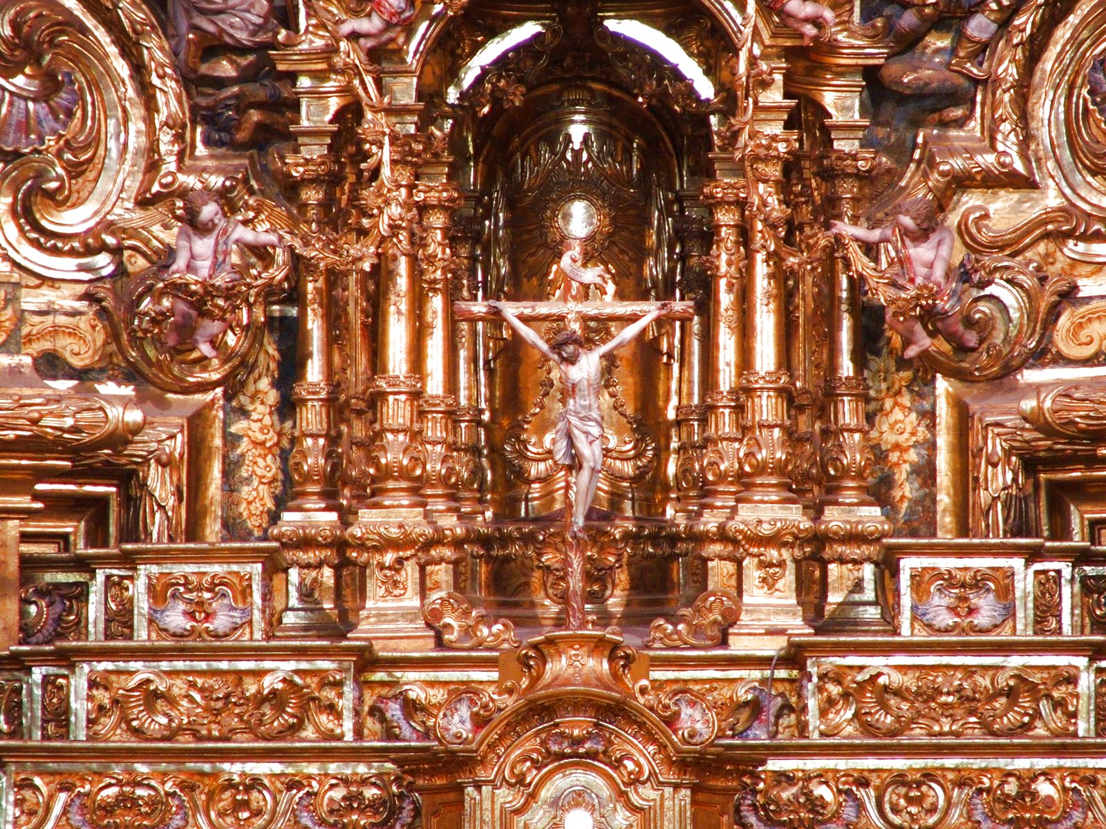 Santuari del Miracle (Riner, Solsonès) - Església - Retaule barroc: el crucifix